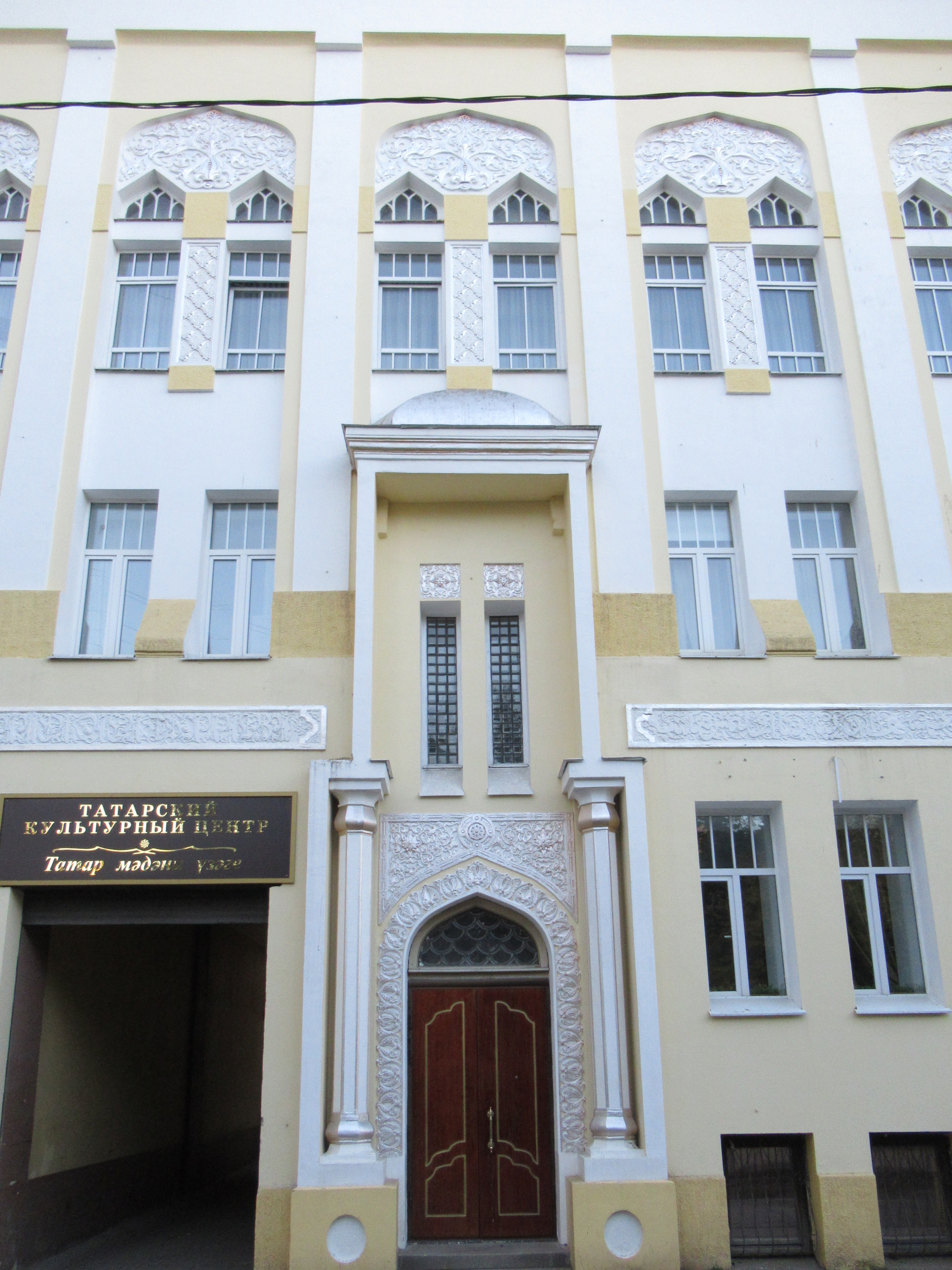 Здание Татарской школы: Татарский М. пер., дом 8, строение 1, Замоскворечье, Центральный округ, Москва